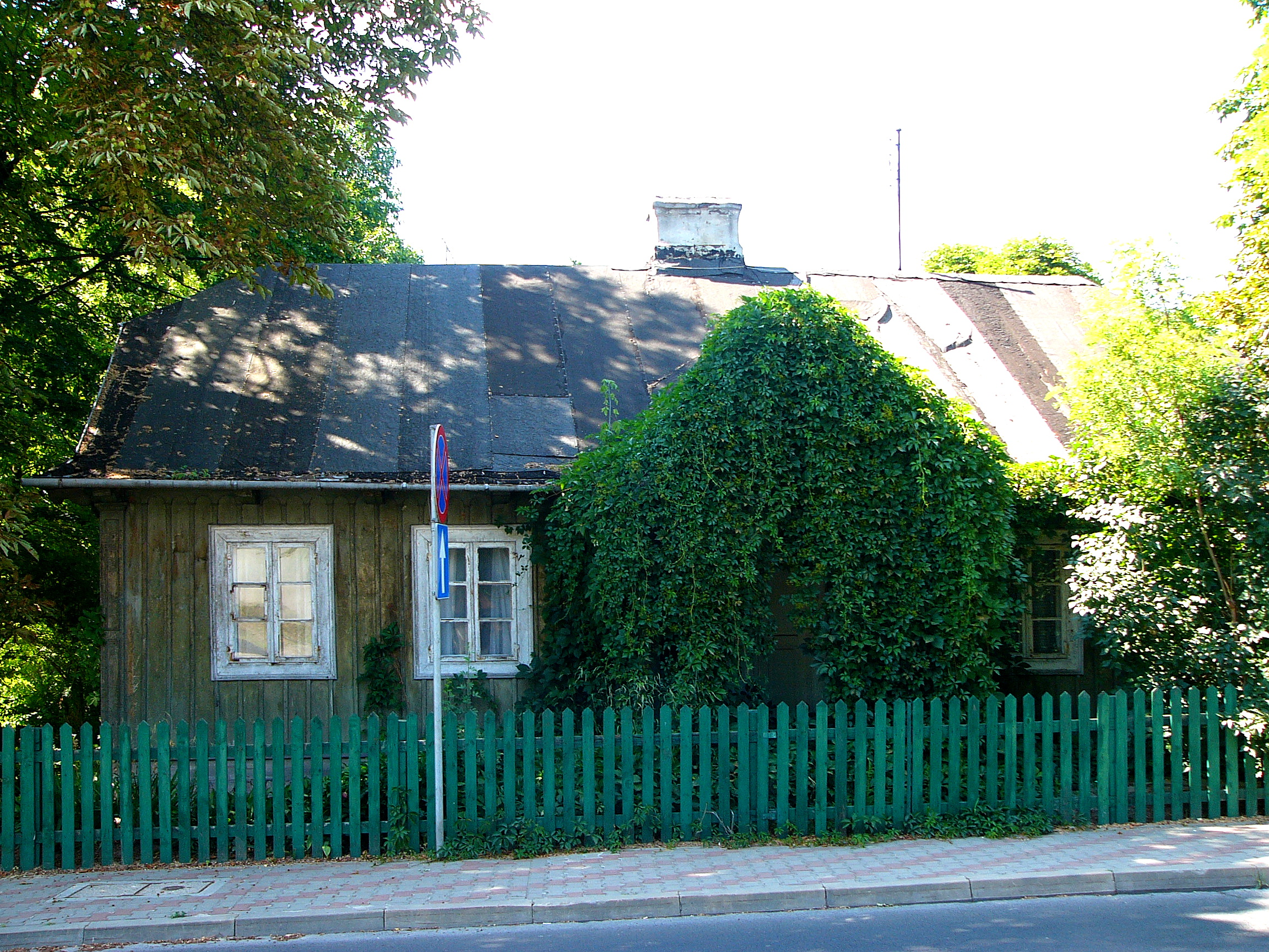 Das Geburtshaus des Prof. Wiktor Zin in Hrubieszów.